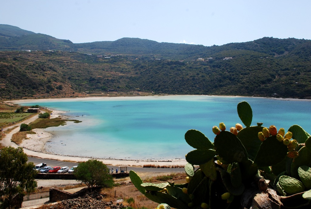 pantelleria_14